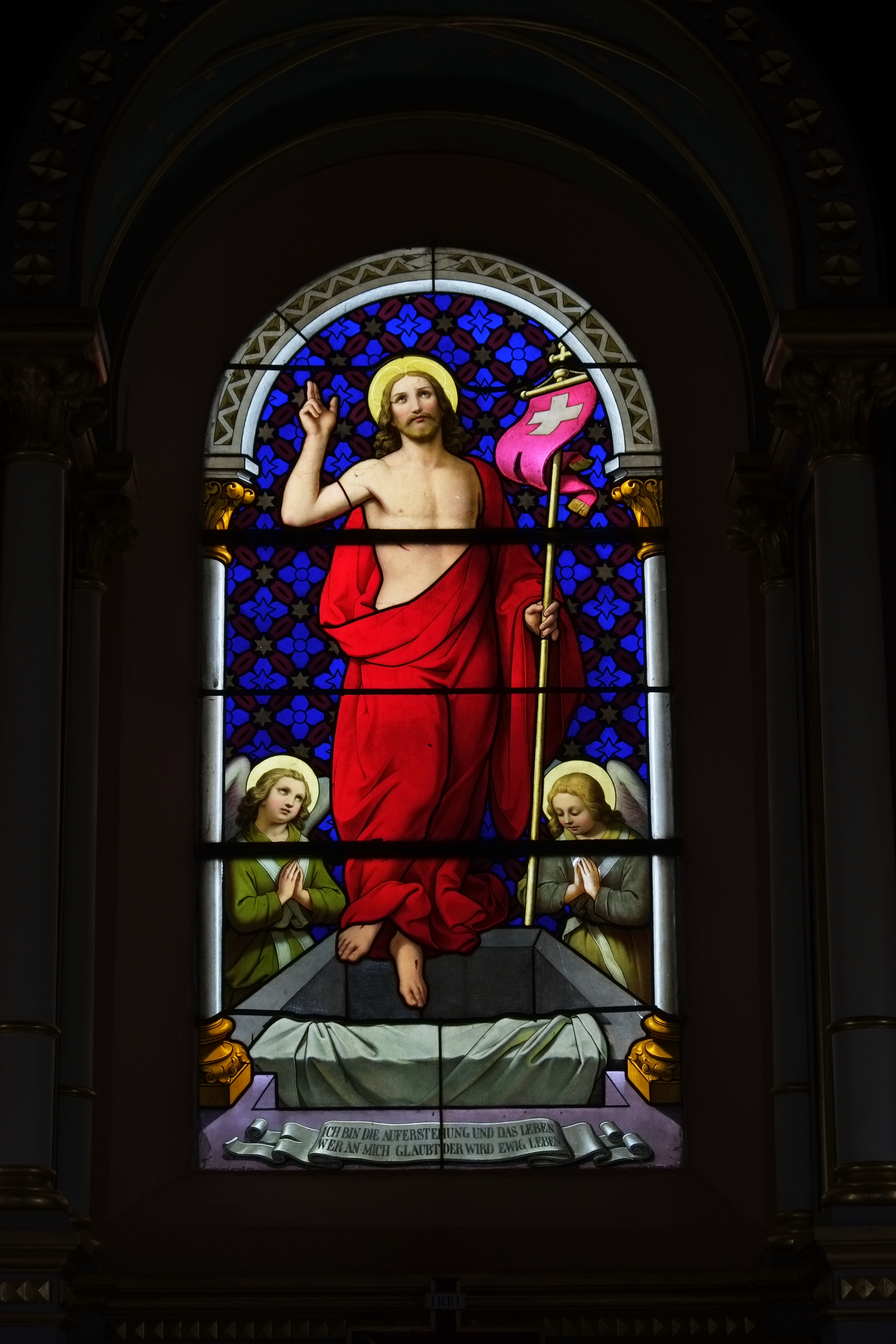 katholische Pfarrkirche St. Katharina in Ettelried, einem Ortsteil von Dinkelscherben im Landkreis Augsburg (Bayern), Bleiglasfenster in der Seelenkapelle neben der Kirche